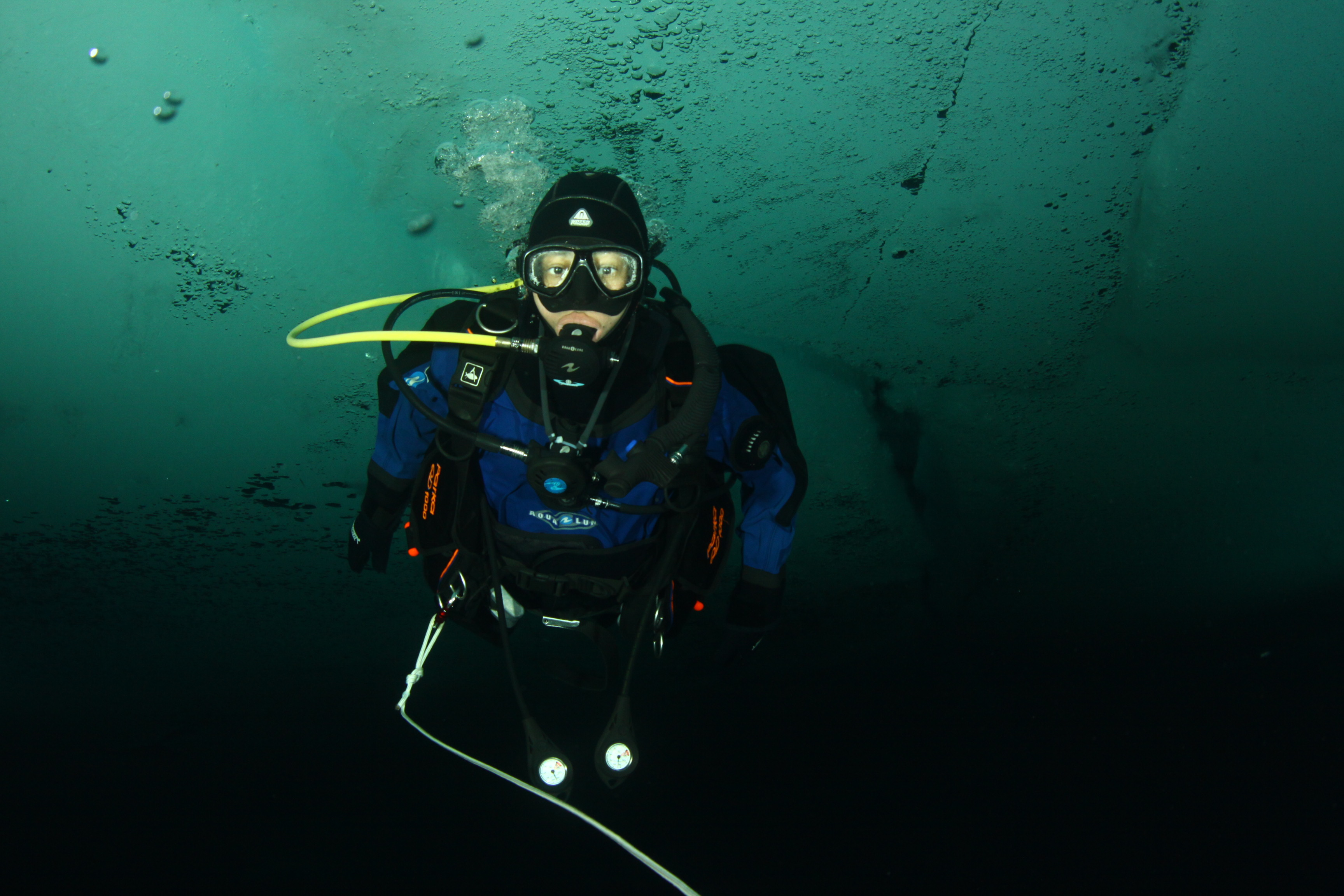 Mariam